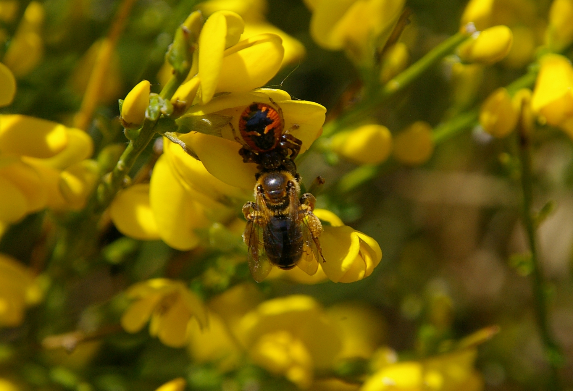 Krabbenspinne Synema globosum und Sandbiene, Gattung Andrena aufgenommen im Mai 2005 in der Provence